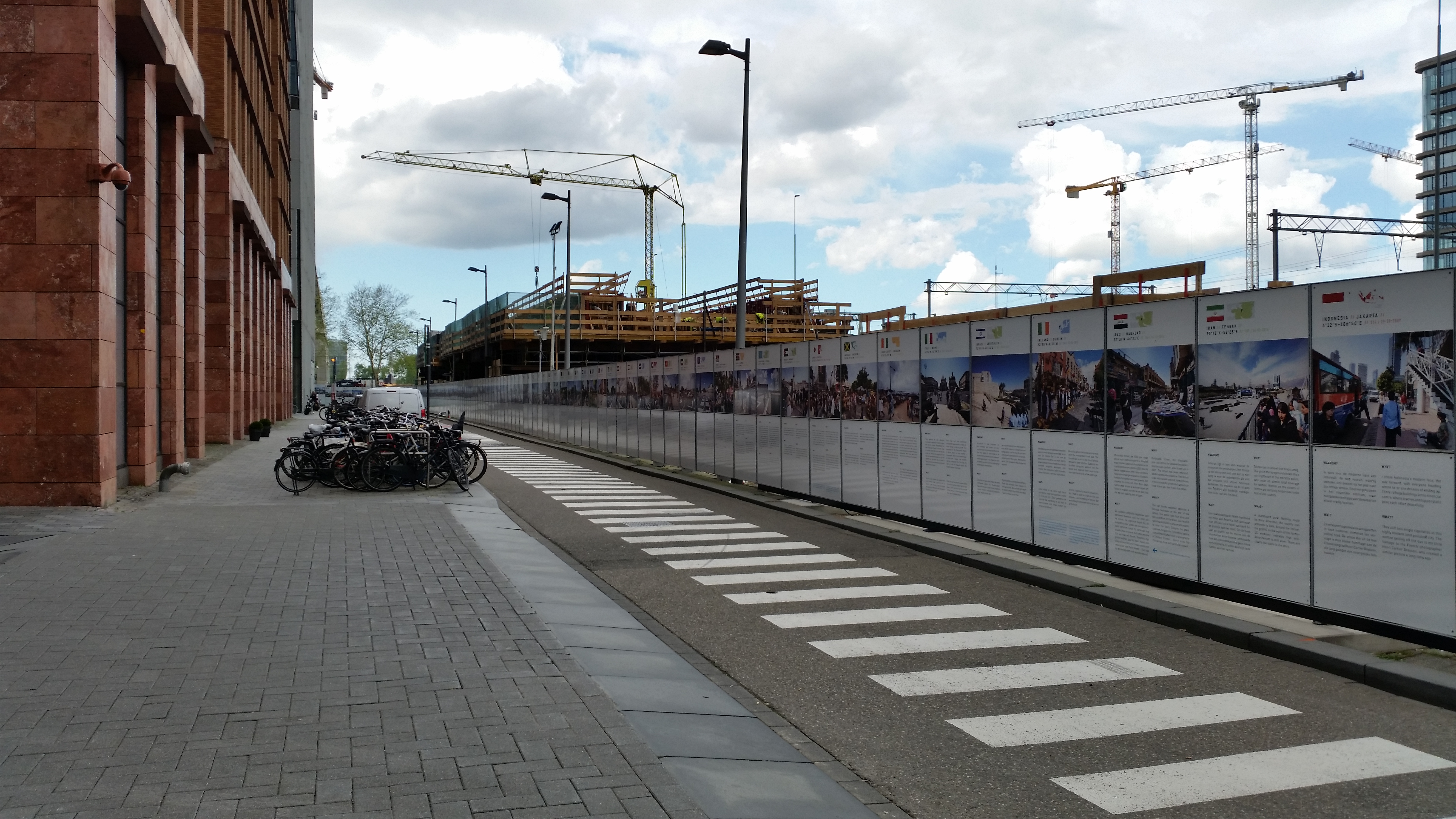 Wand met Streets of the world